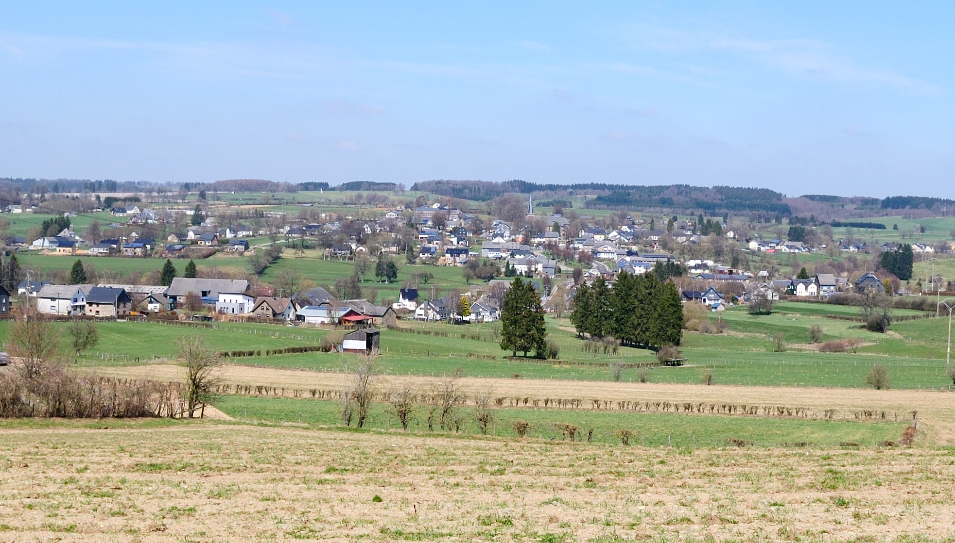 Zicht op Amel.